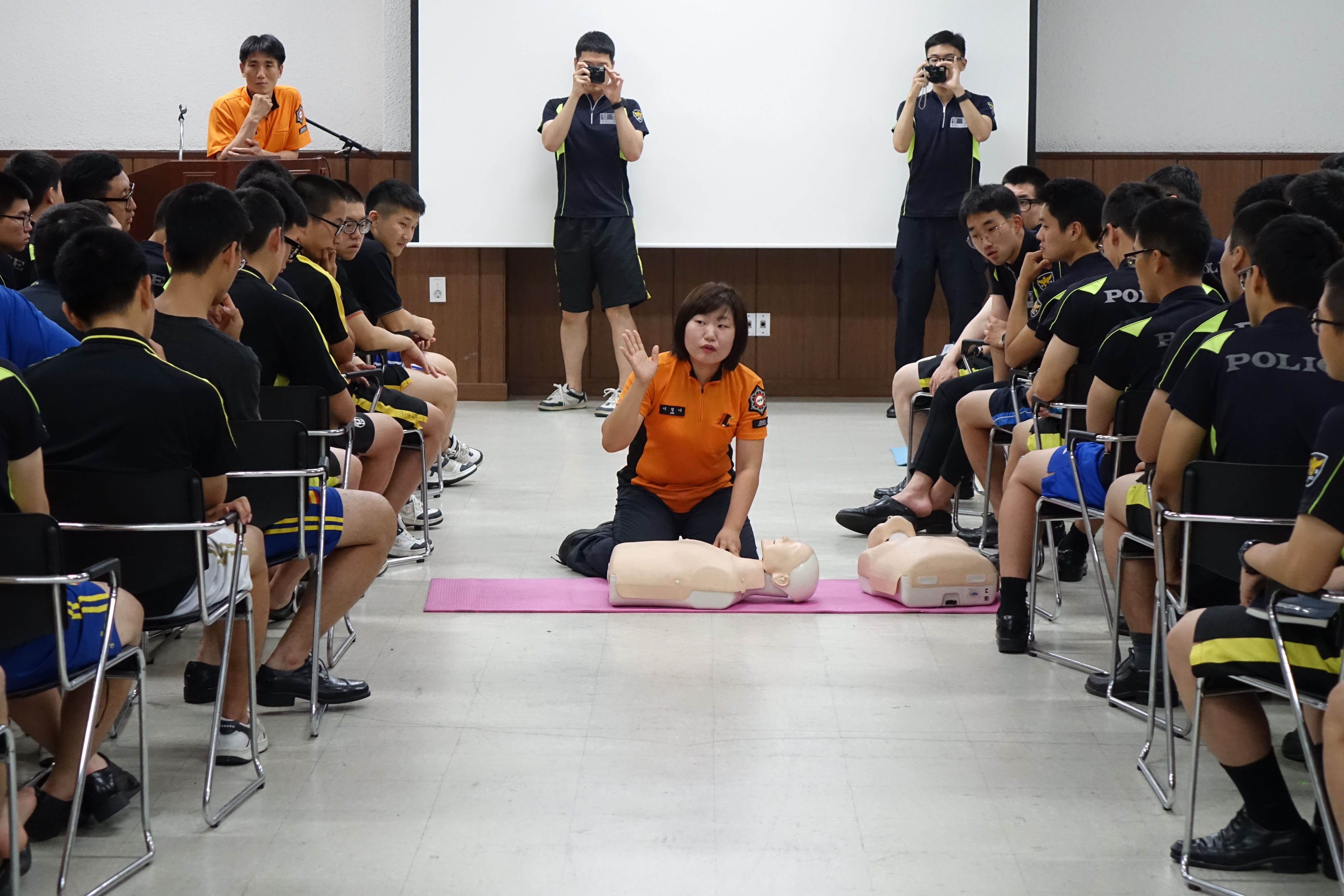 2015년 심폐소생술 교육, 이빛나